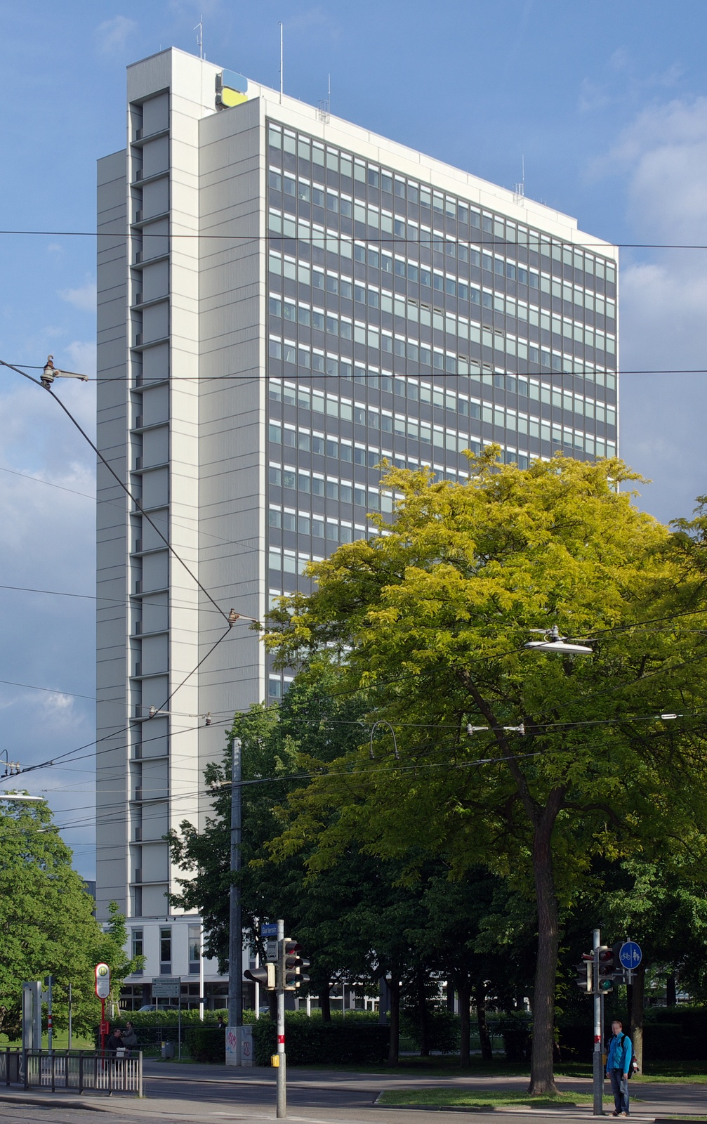 Das Verwaltungsgebäude der LVA Baden in Karlsruhe, heute Deutsche Rentenversicherung Baden-Württemberg. Denkmalgeschützter Bau von Erich Schelling.